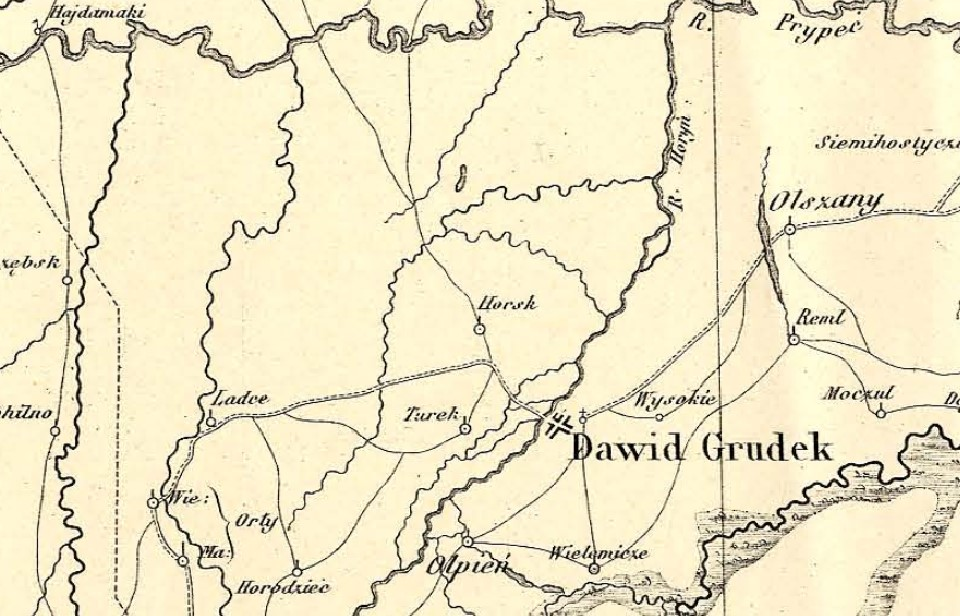 Вёска Хорск на мапе Atlas historyczny Rzeczypospolitej Polskiej wydany z zasilkiem Akademii Umiejetnosci w Krakowie Epoka Przełomu z wieku 16-17-sty Dzial 2-gi Zieme Ruskie Rzeczypospolitej